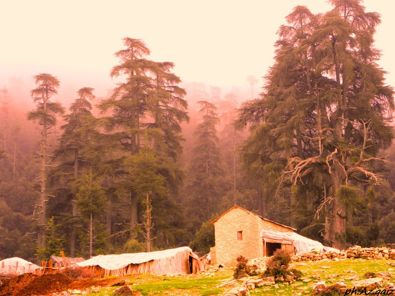 Maison à Ajdir province de Khénifra